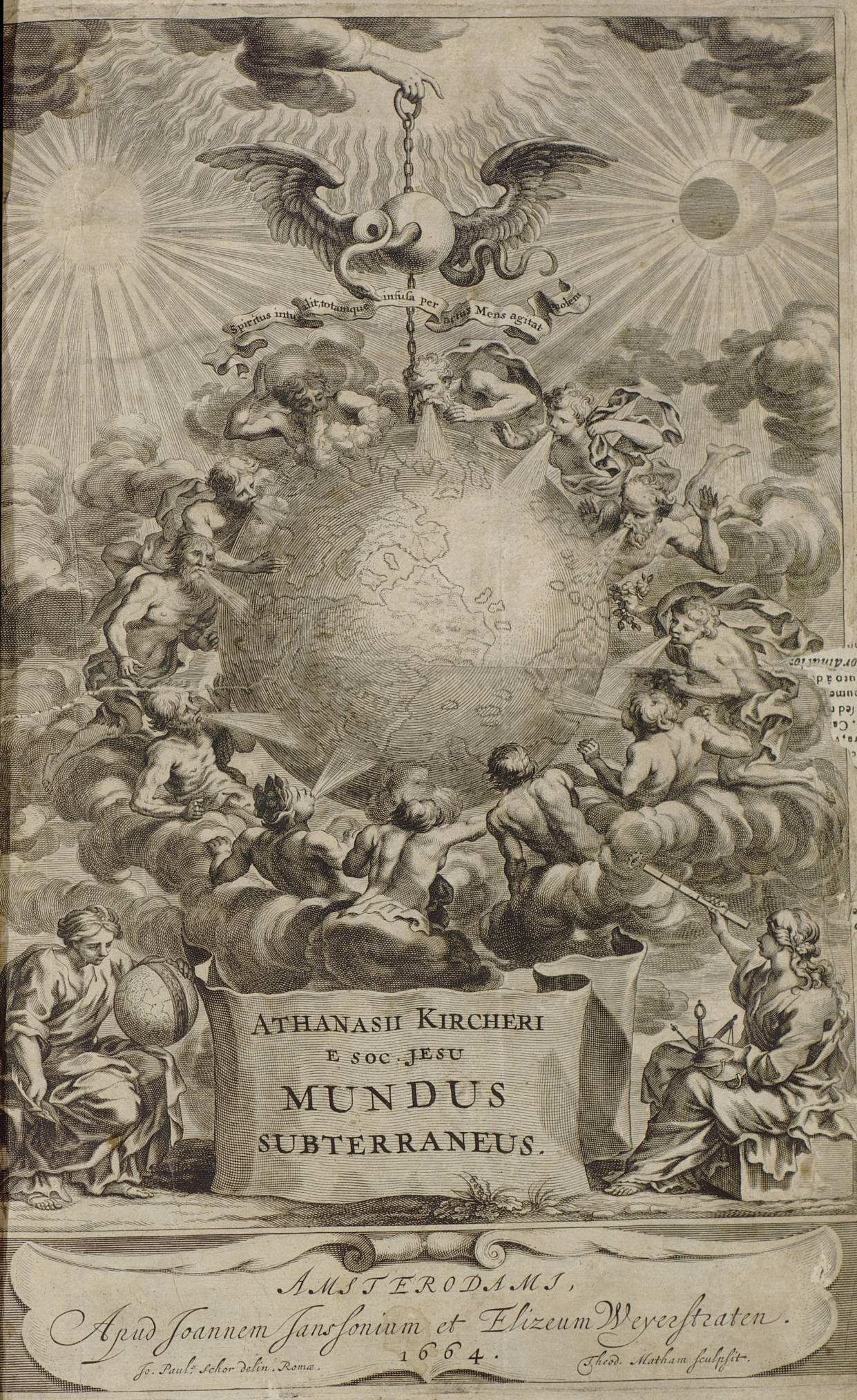 Frontispicio de Athanasius Kircher, Mundus subterraneus, 1664, grabado de Theodor Matham por dibujo de Johann Paul Schor. Firmado: "Jo. Paul Schor delin. Romae / Theod. Matham sculpsit". Madrid, Biblioteca Nacional de España